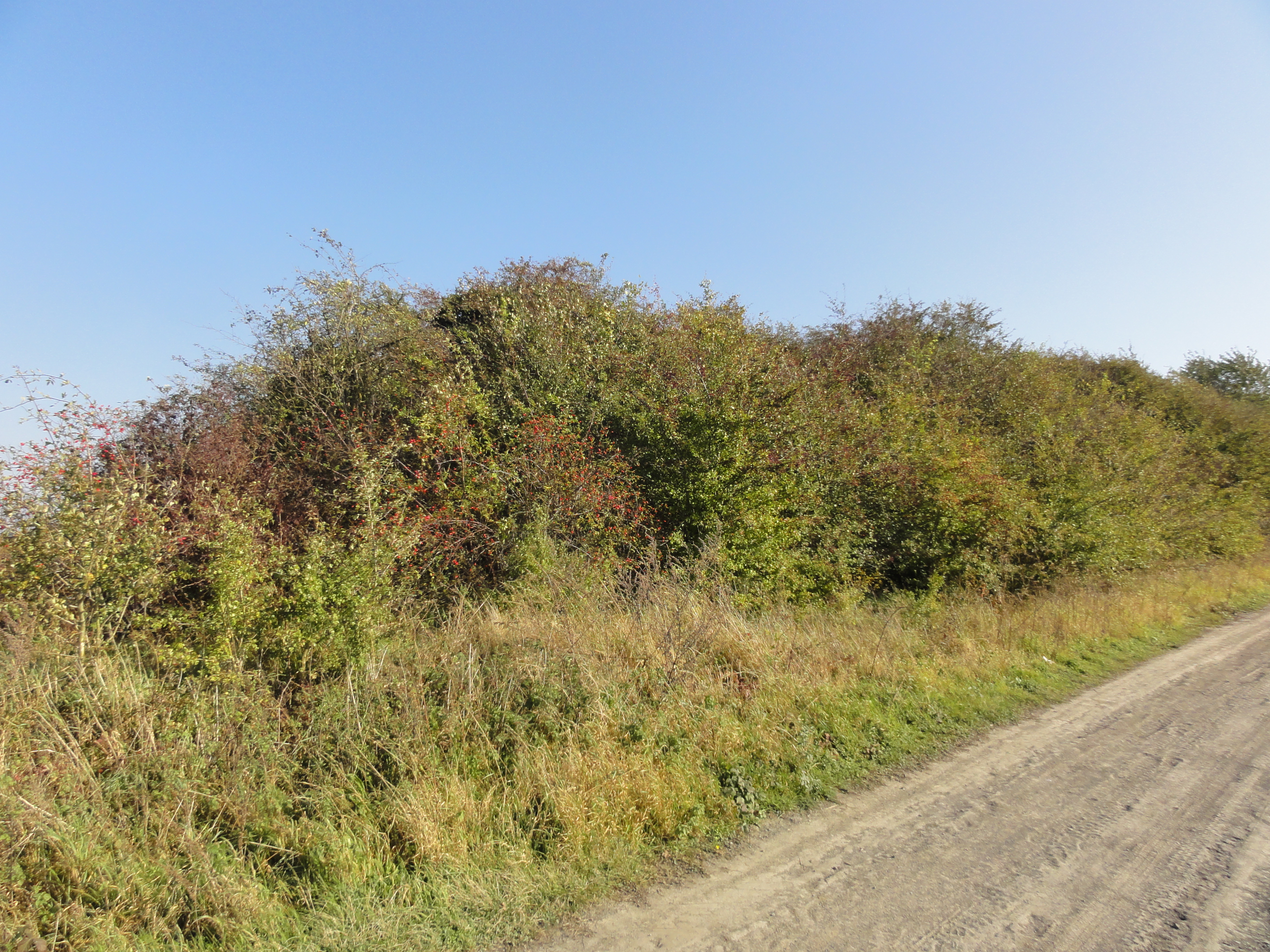 Terril n° 69 dit 2 de Meurchin, Fosse n° 2 - 7 de la Compagnie des mines de Meurchin, Meurchin, Pas-de-Calais, Nord-Pas-de-Calais, France.